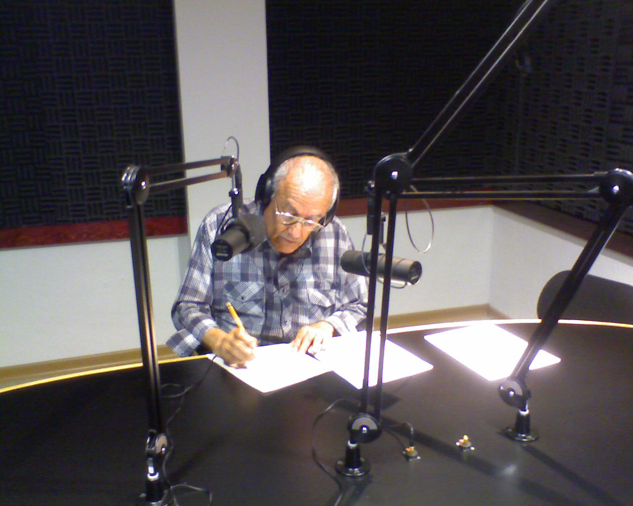 Transmisión del programa "Serenata guadalupana" 2008